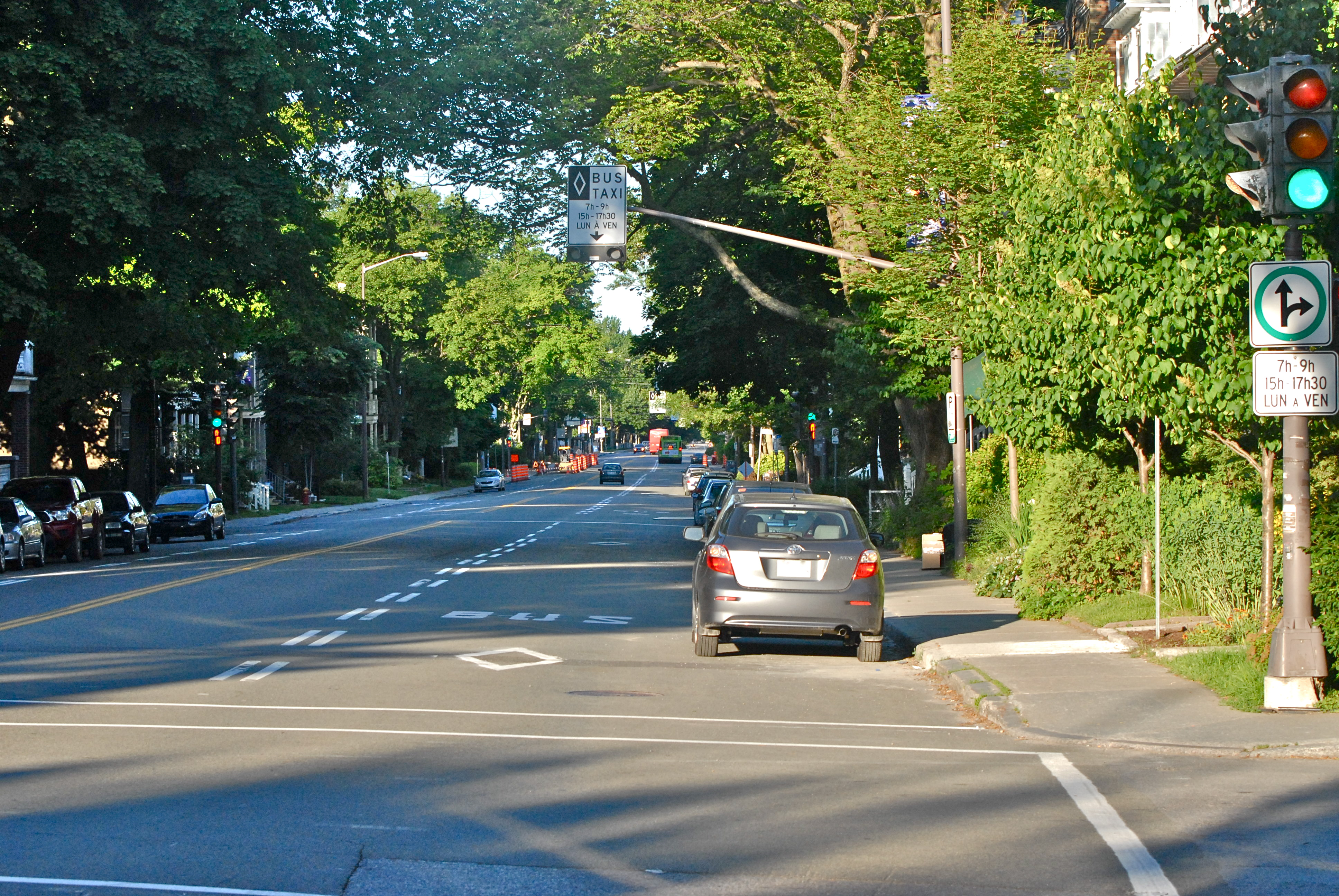 Une partie du boulevard René-Lévesque, à Québec, tôt un dimanche matin au lever du soleil